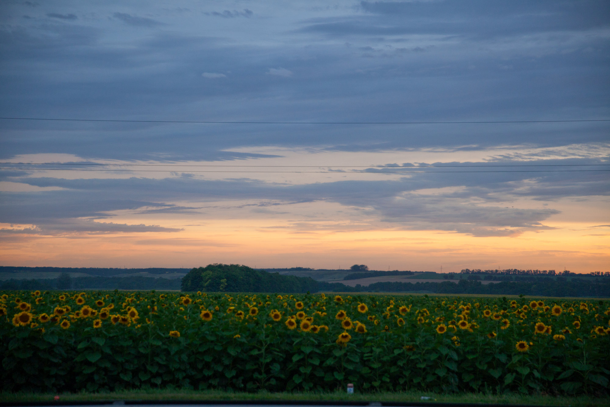 Краснодарский край